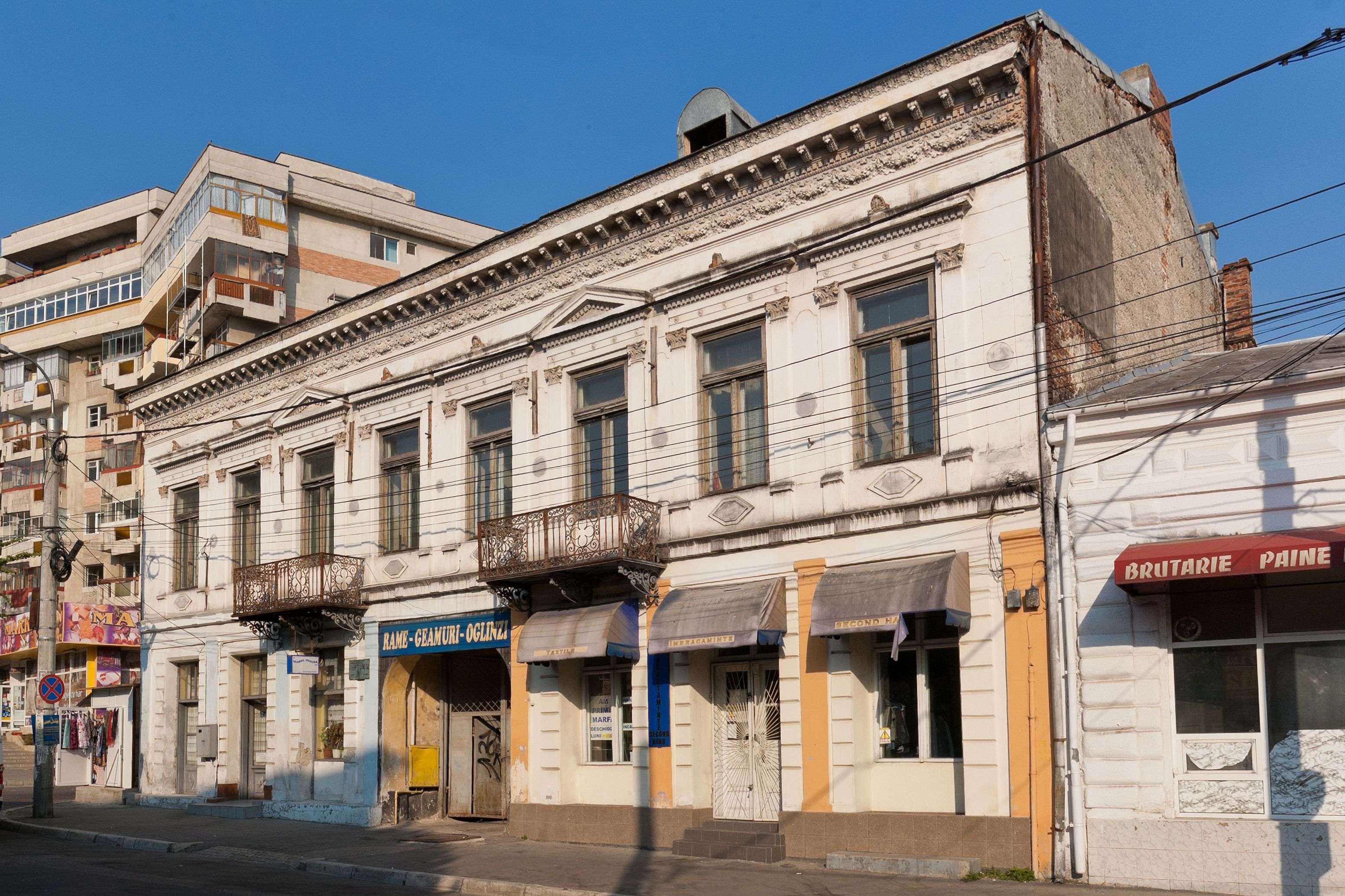 Fotografia prezinta Hanul Gabroveni din Pitesti, vazut dinspre E.